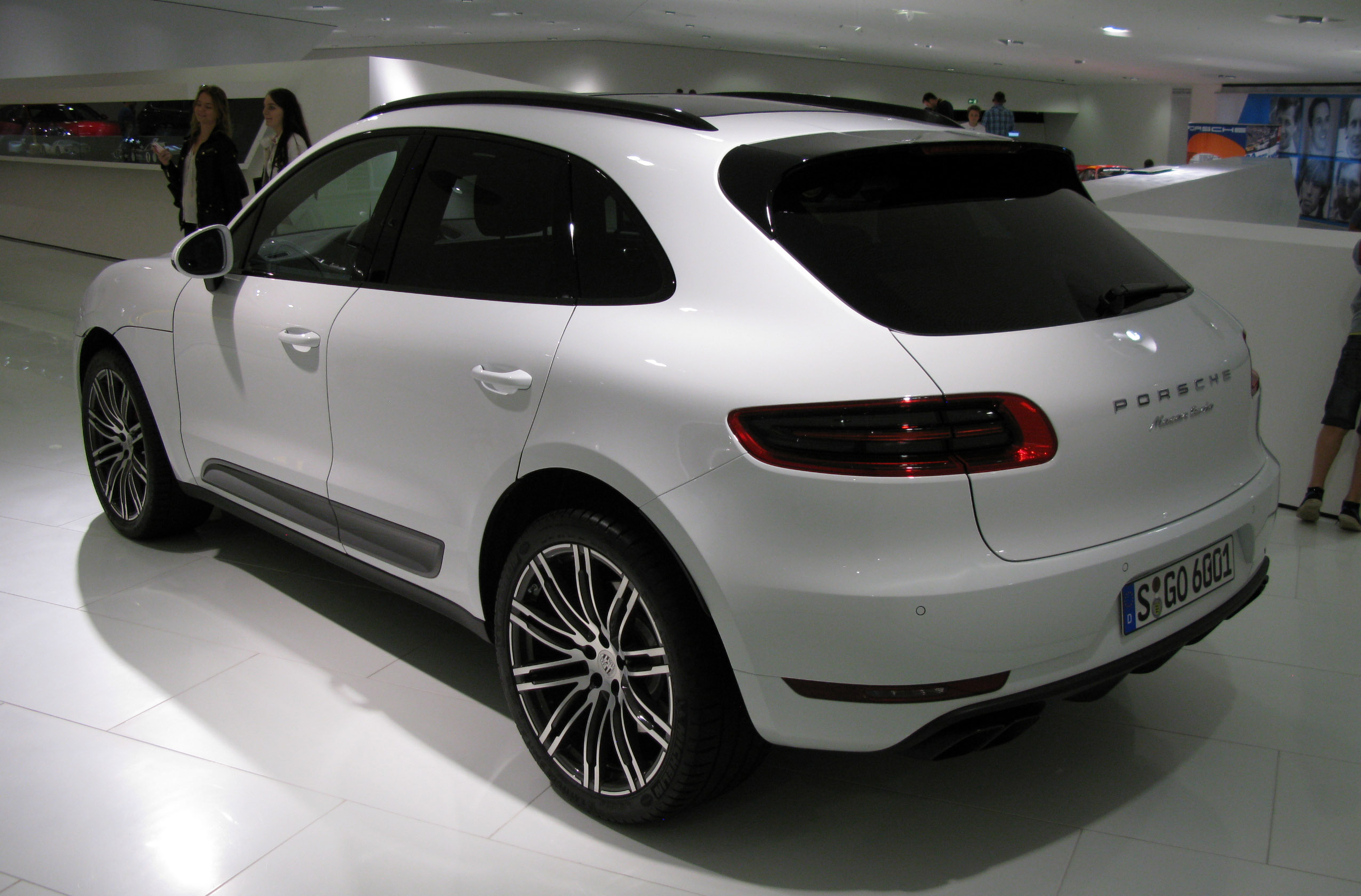 Porsche Macan Turbo